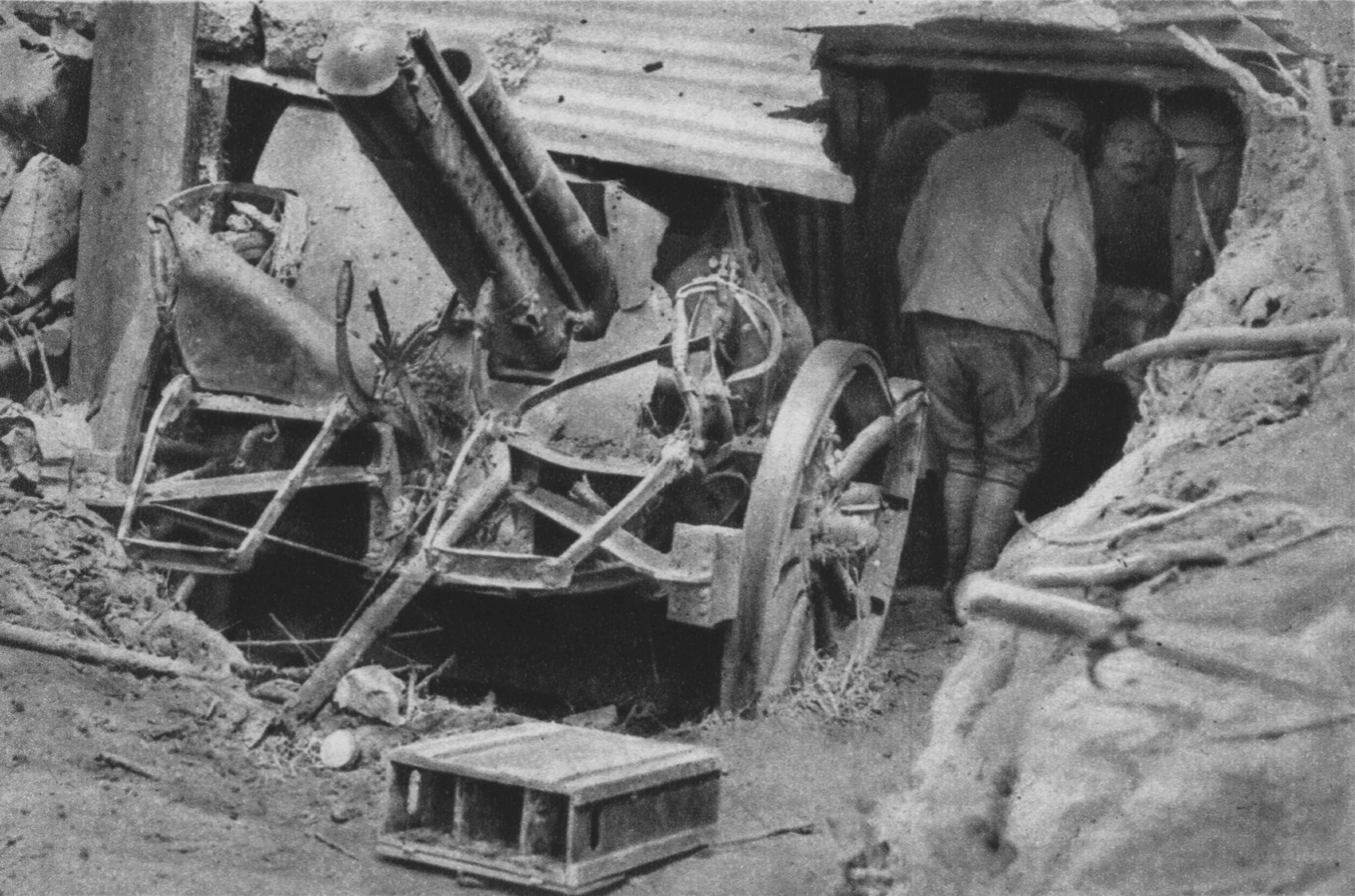 Zerschlagene deutsche Feldkanone im Wald von Méreaucourt (17. Juli 1916).